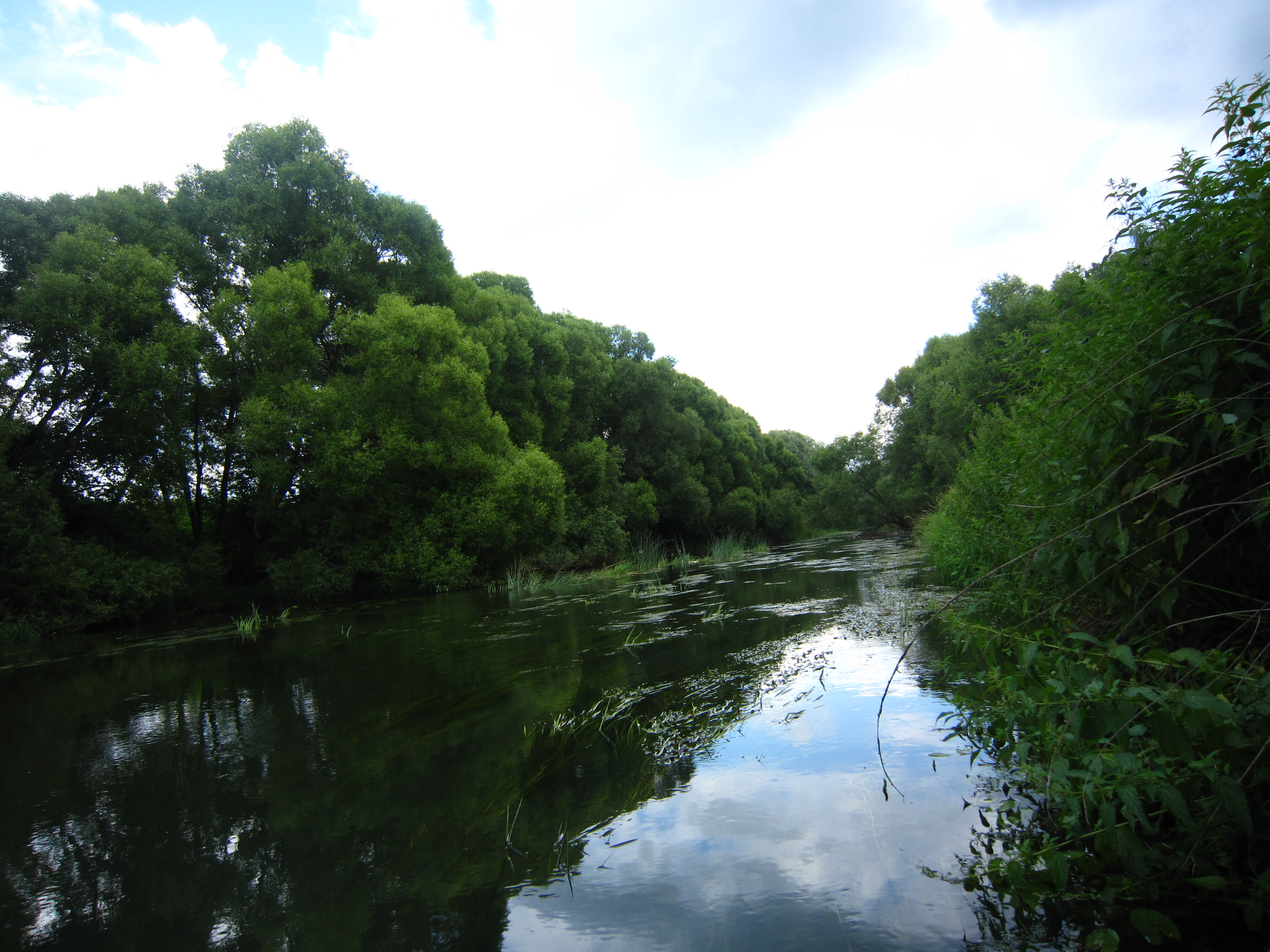 Река Лужа в районе деревни Шемякино